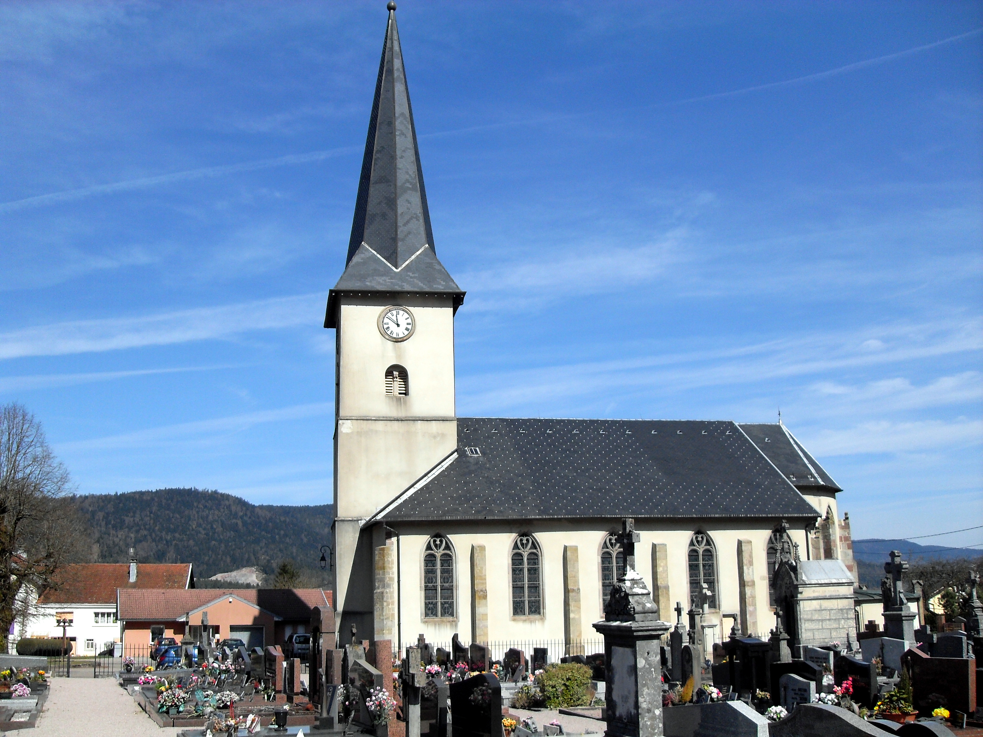 L'église Saint-Laurent à Dommartin-lès-Remiremont